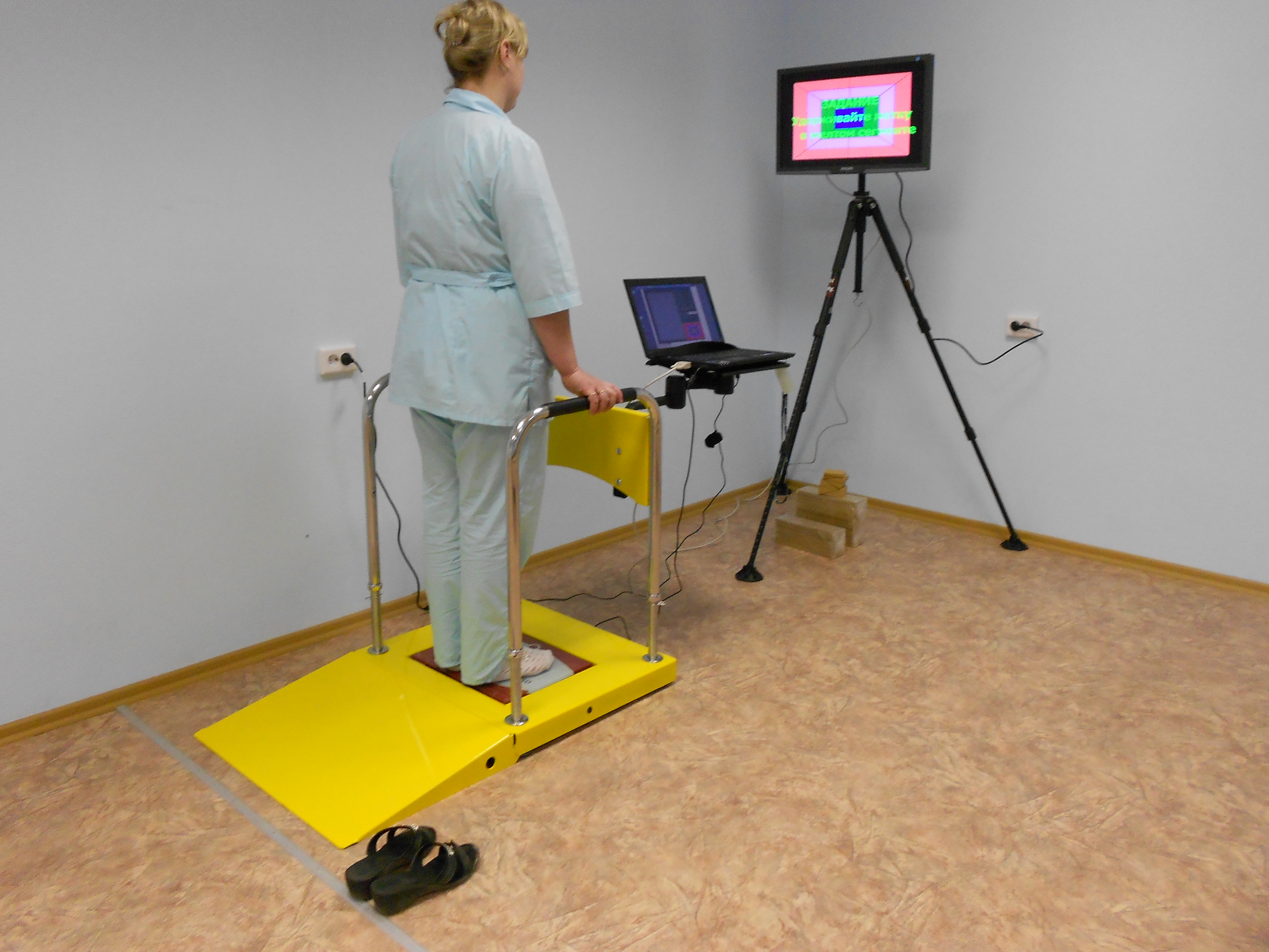 Стабилоплатформа